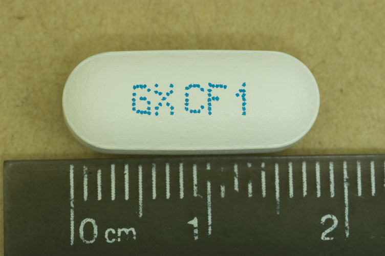 VALTREX® (valaciclovir hydrochloride) 500 mg caplet